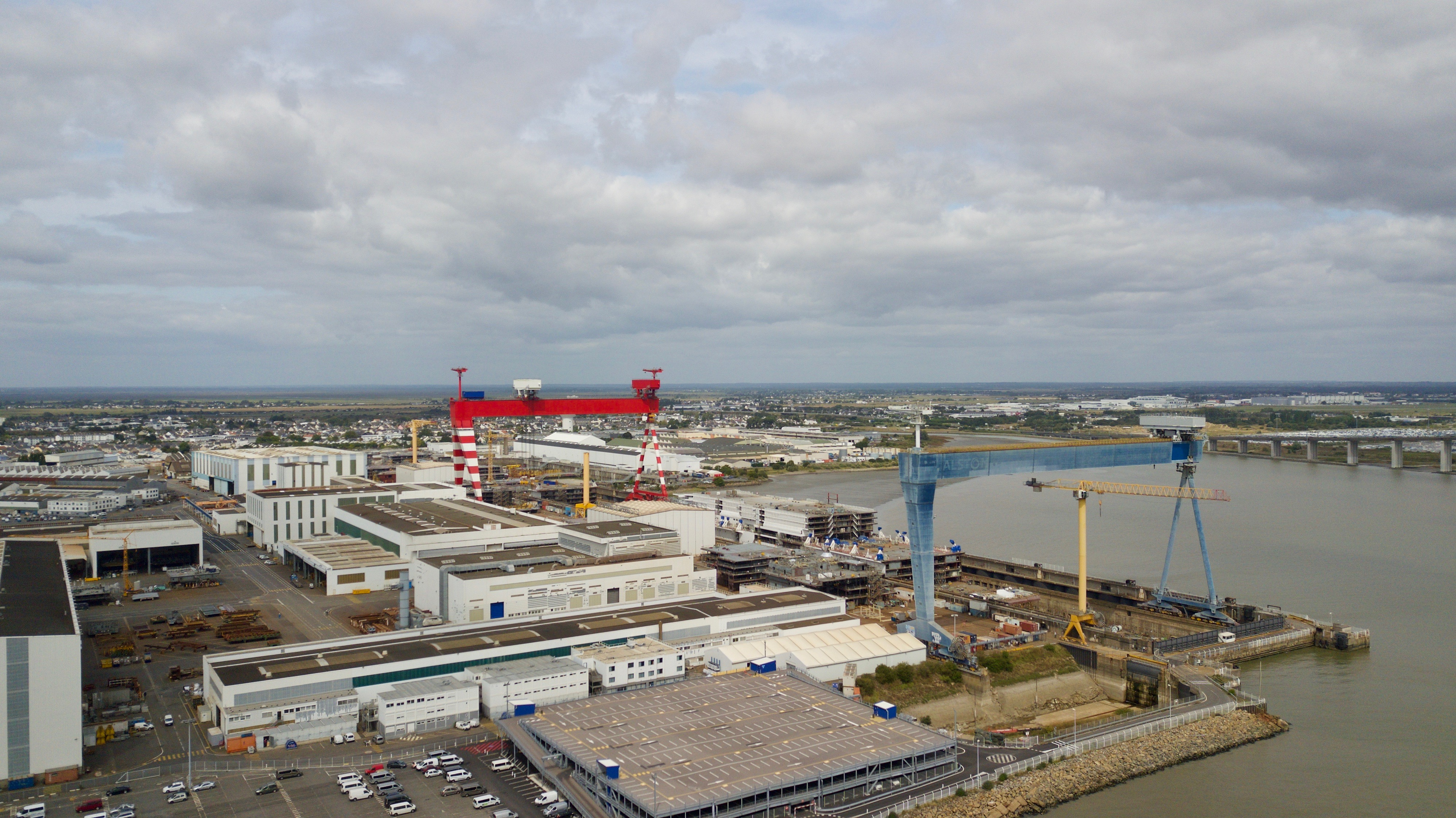 Vue des sites principaux de construction, depuis l'estuaire de la Loire.